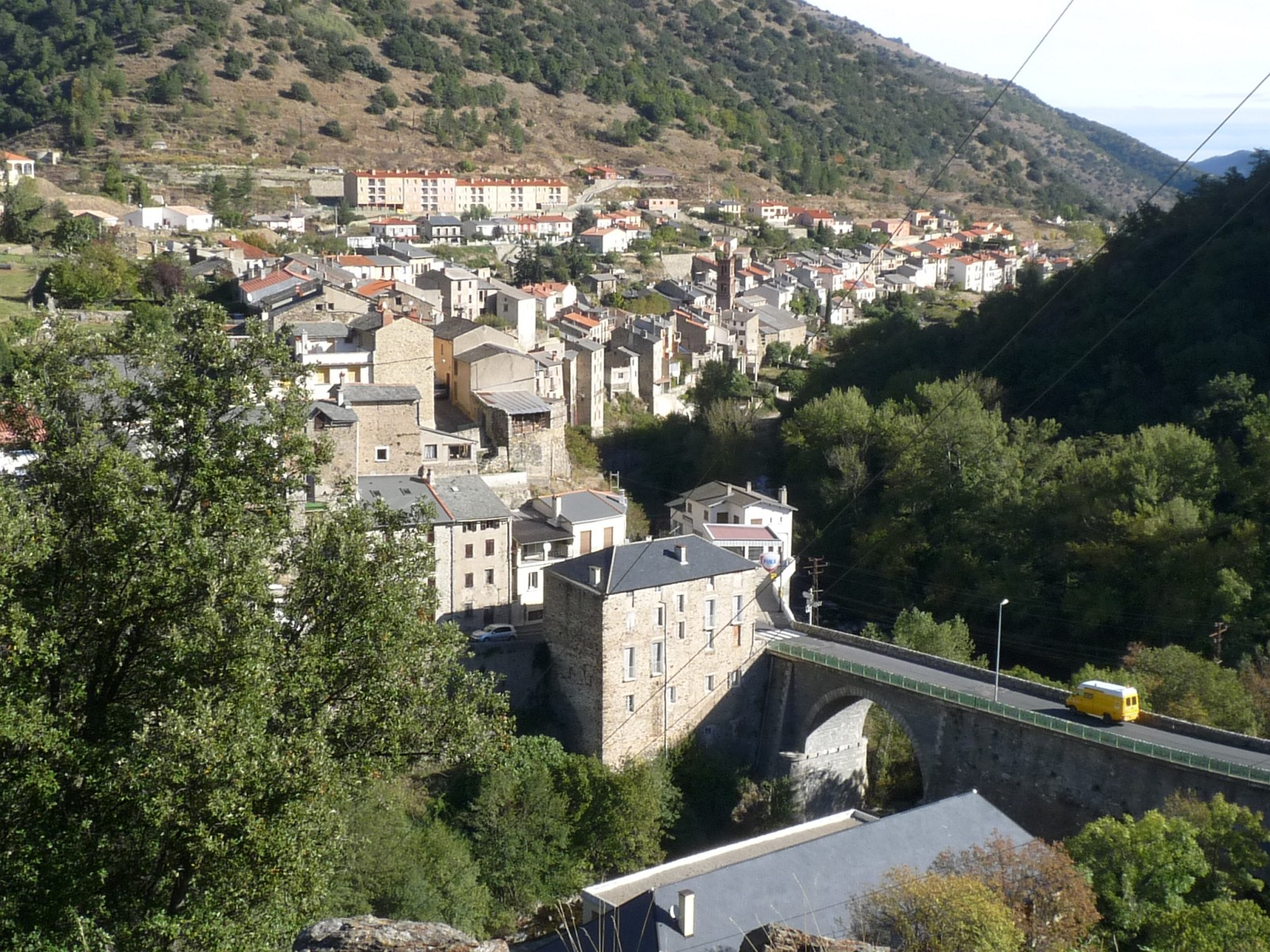 Vue d'Olette, Pyrénées-Orientales, France